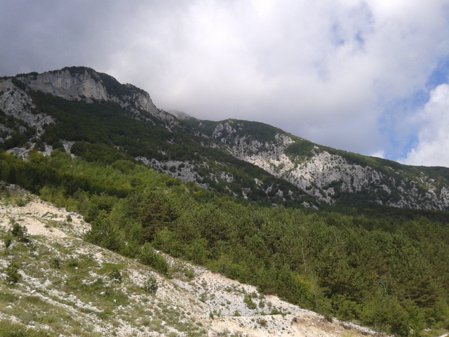 Monte Viglio visto da Meta